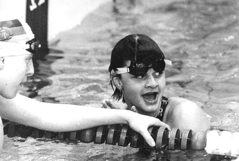 Birgit Meineke, Daniela Übel ADN-ZB Kluge 16.6.83 Gera: 34. DDR-Meisterschaften im Sportschwimmen- 2. Tag- Für eine Riesenüberraschung sorgte im 200-m-Freistilfinale der Damen die erst 14jährige Berliner TSC-Schwimmerin Strid Strauss: (rechts). Überglücklich kann sie den Erfolg über die Vizeweltmeisterin Birgit Meineke (SC Dynamo Berlin) noch nicht so recht fassen. Links im Foto Daniel Uebel (SC Karl-Marx-Stadt-3. Platz).